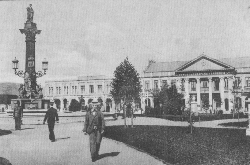 Imagen de la Plaza de la Independencia hacia 1910, en la ciudad de Concepción, Chile.